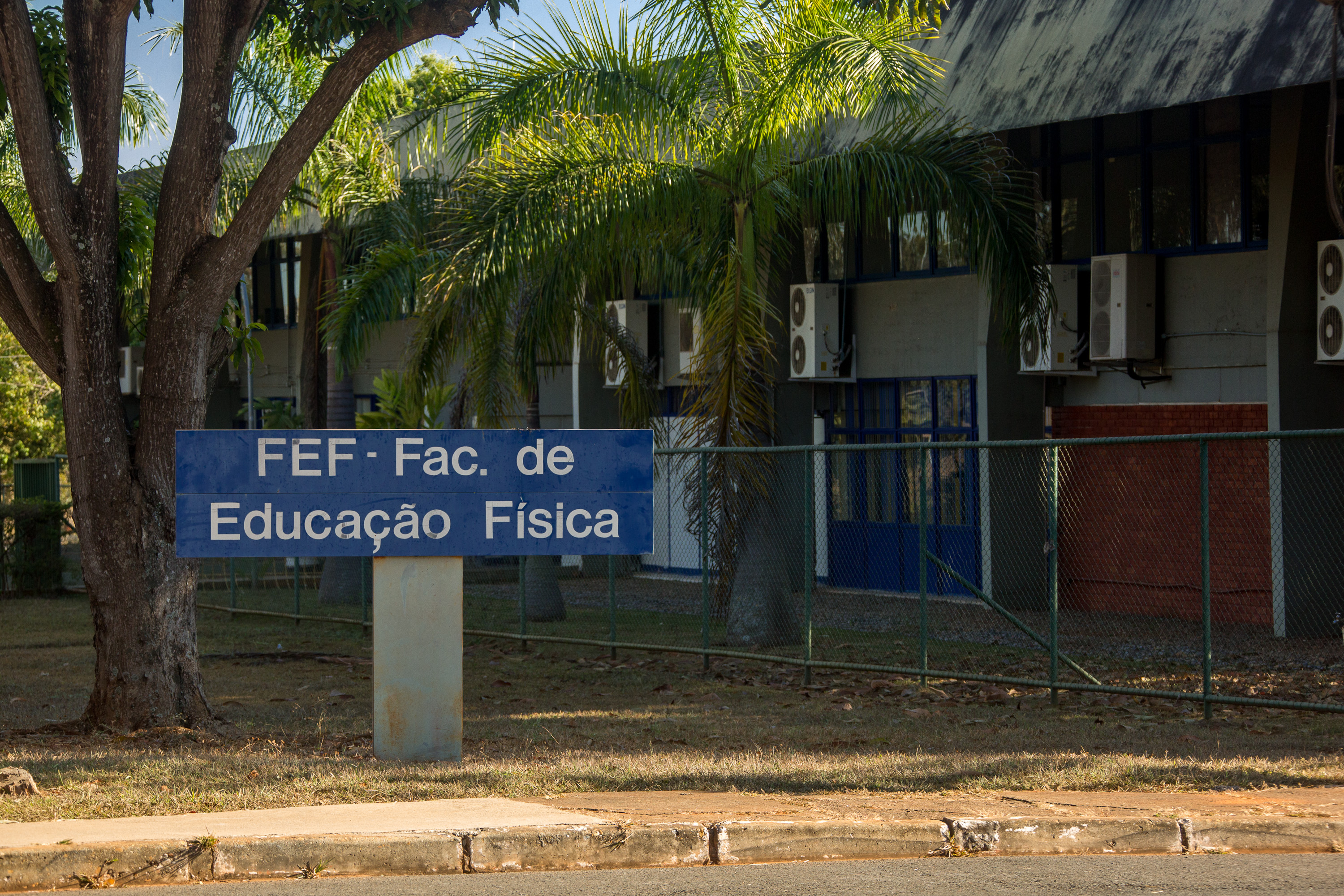 Faculdade de Educação Física, localizada junto ao Centro Olímpico da Universidade de Brasília. Foto: Luis Gustavo Prado/Secom UnB.